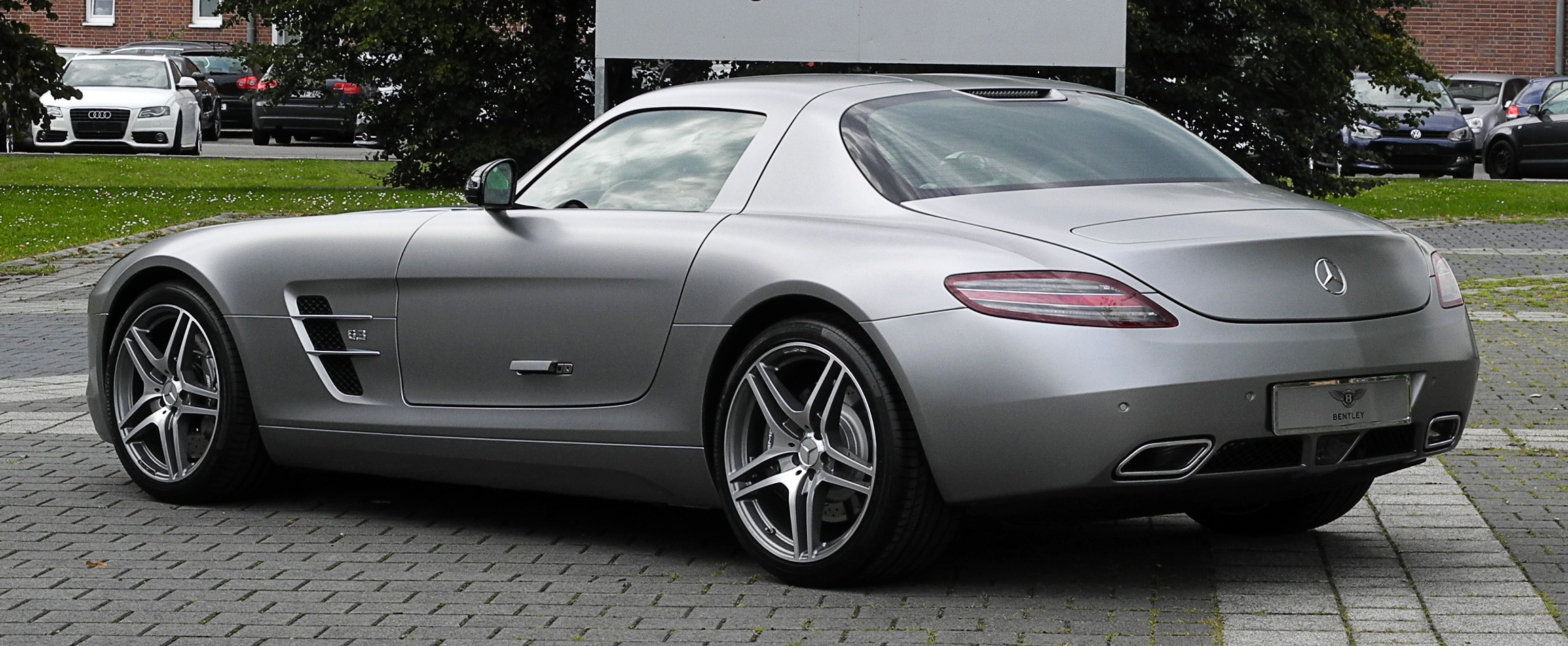 Mercedes-Benz SLS AMG (C 197)